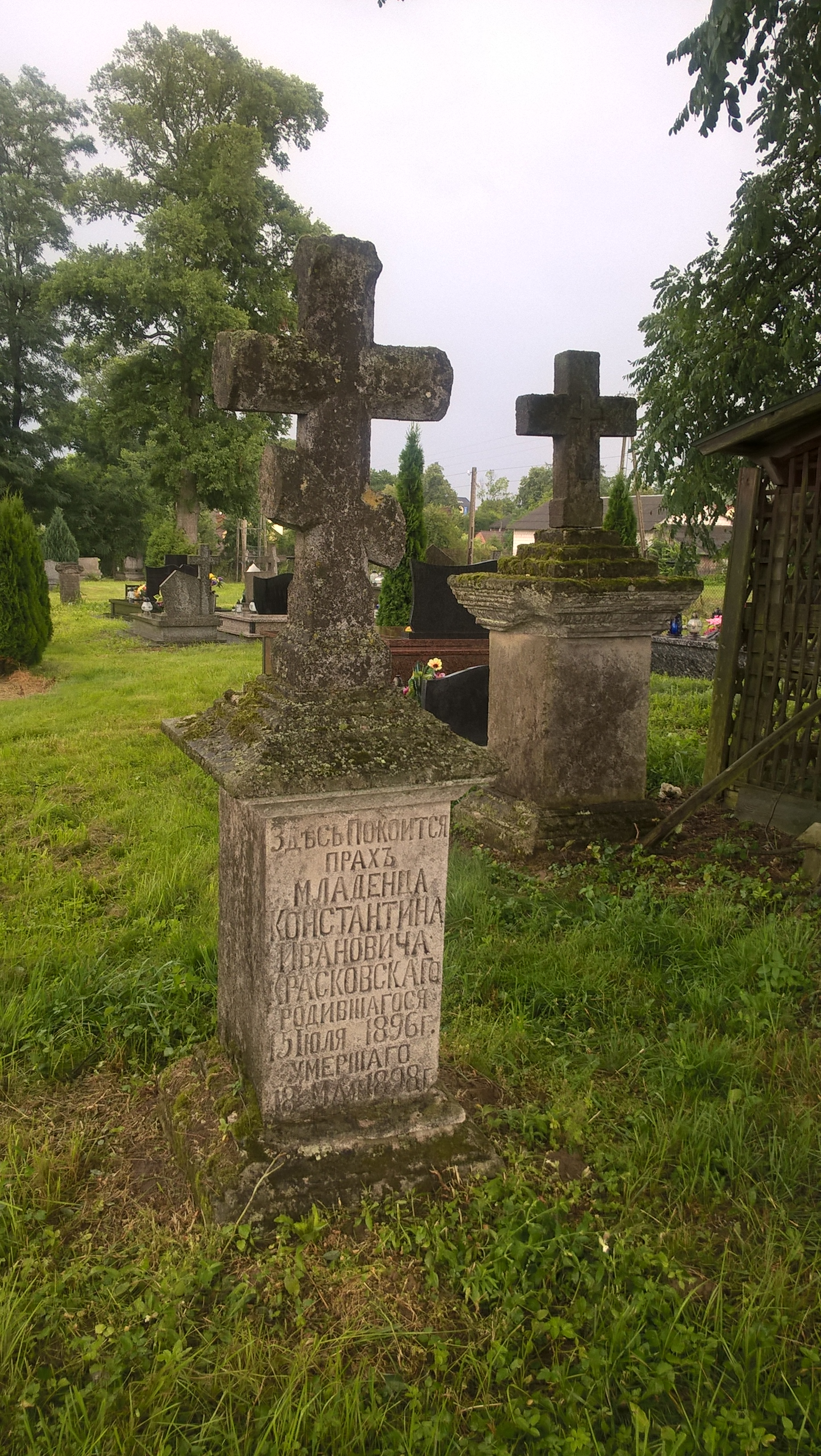 Cmentarz prawosławny w Biszczy